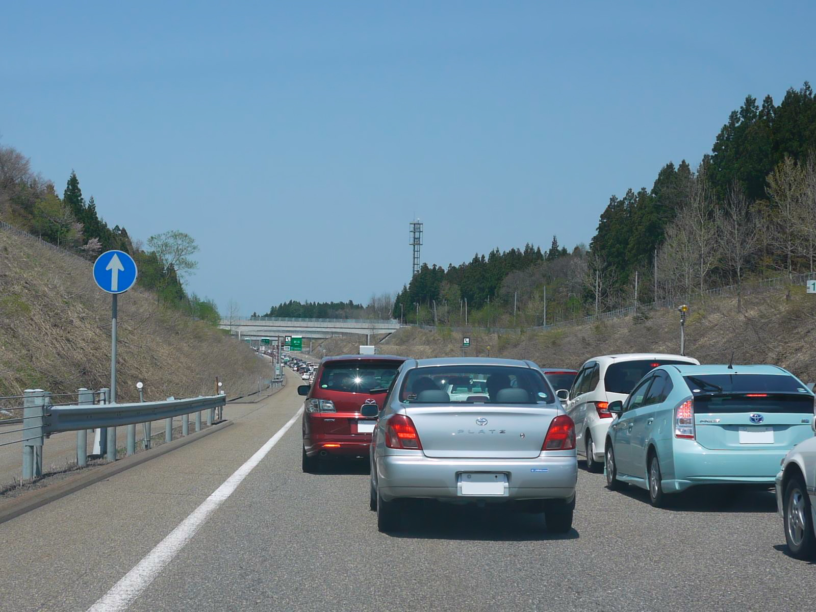 上信越自動車道下り線中郷インターチェンジ付近の渋滞の様子。前方の車両のナンバープレートを加工してある。